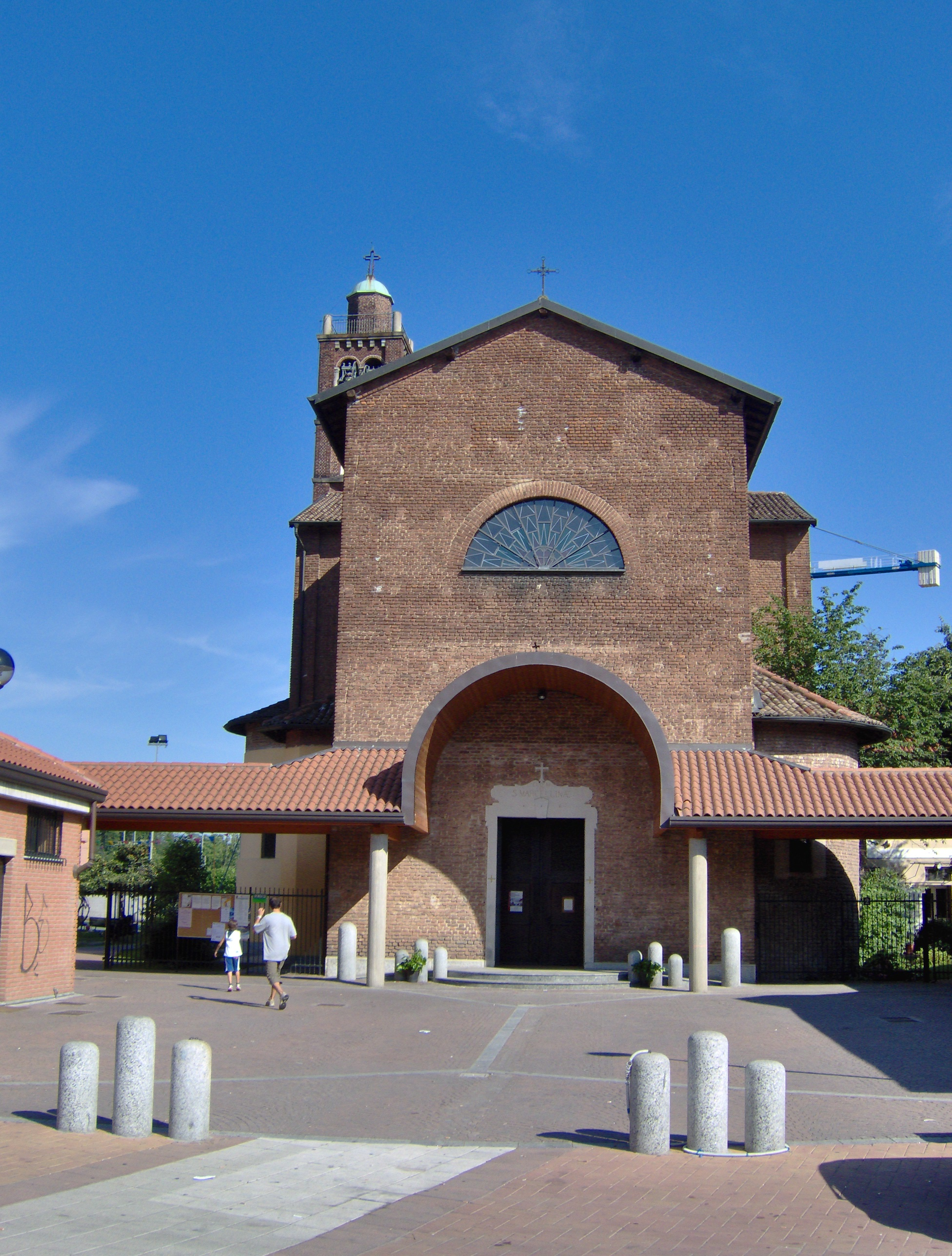 Parrocchia S. Marcellina in Muggiano